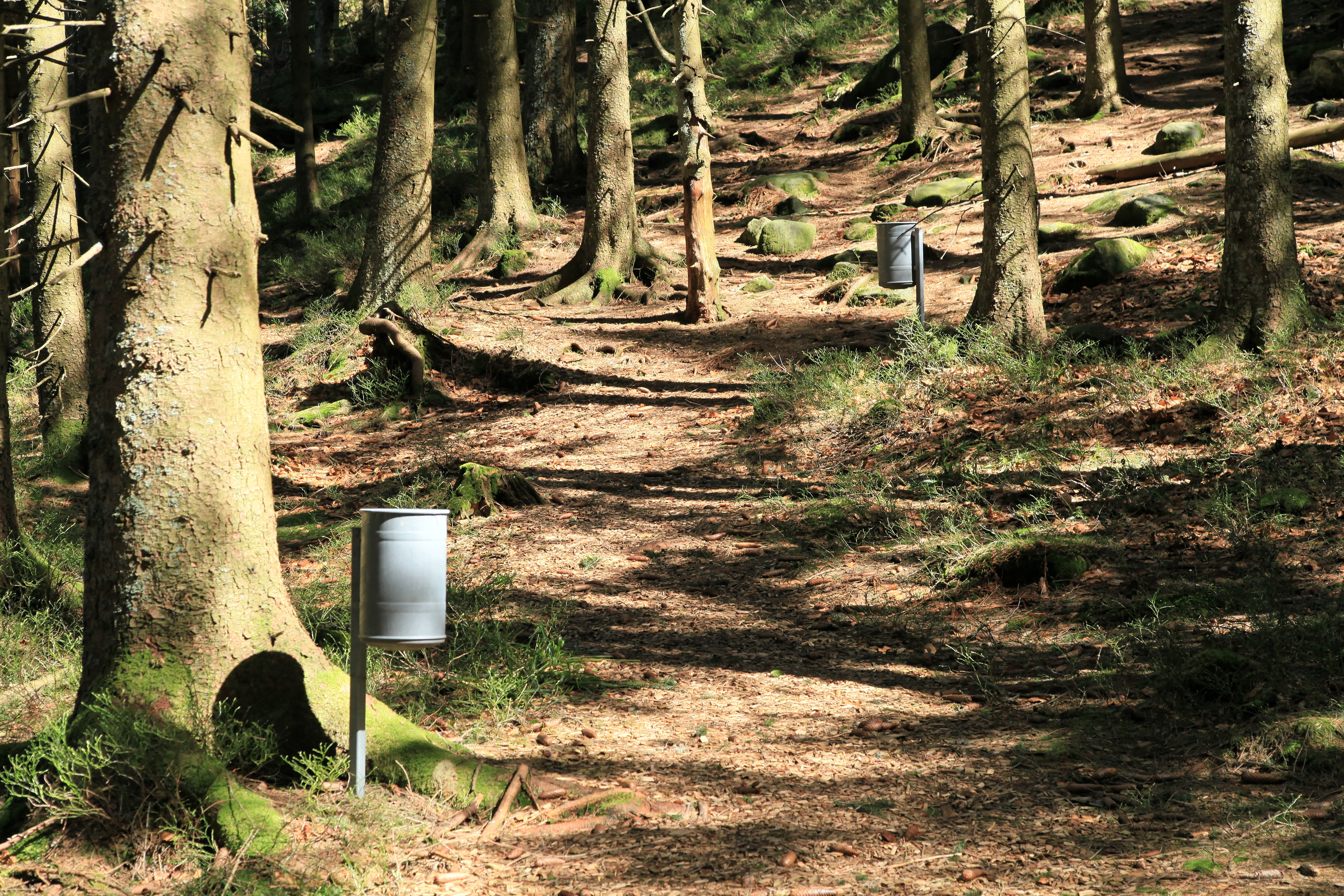 "Ausflug an den Mummelsee" von Roger Aupperle, Kunstpfad am Mummelsee, Schwarzwaldhochstraße in Seebach (Baden)